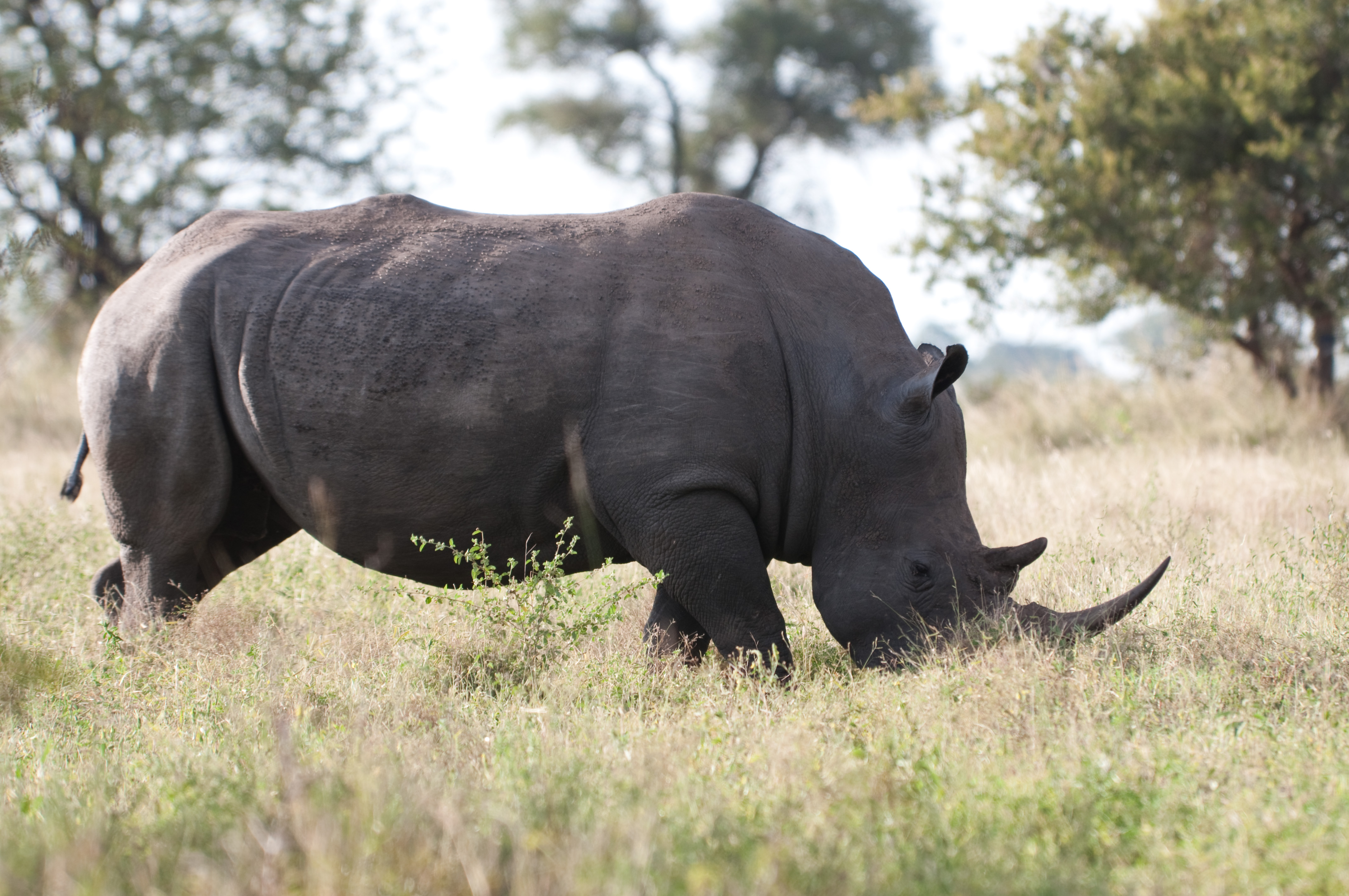 White Rhino Grazing